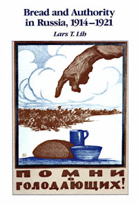 Lih L. T. Bread and Authority in Russia, 1914-1921. — Berkeley: University of California Press, 1990. — 303 p. — (Studies on the history of society and culture, Vol. 10; University of California Press eScholarship editions). — ISBN 9780520065840. — ISBN 0520065840.